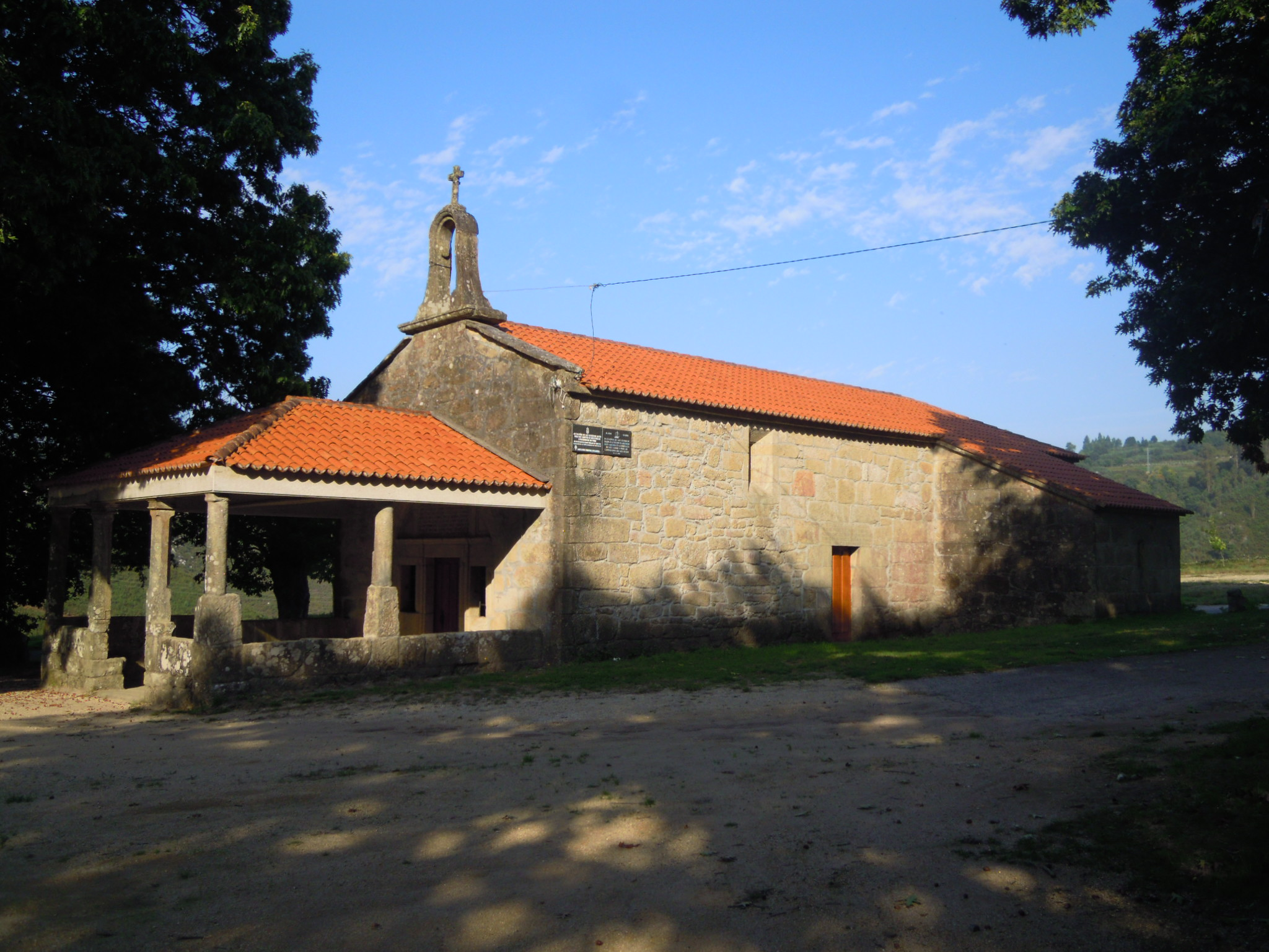 Capela dos santos Xusto e Pastor, na carballeira de San Xusto, en San Xurxo de Sacos (Cerdedo-Cotobade).